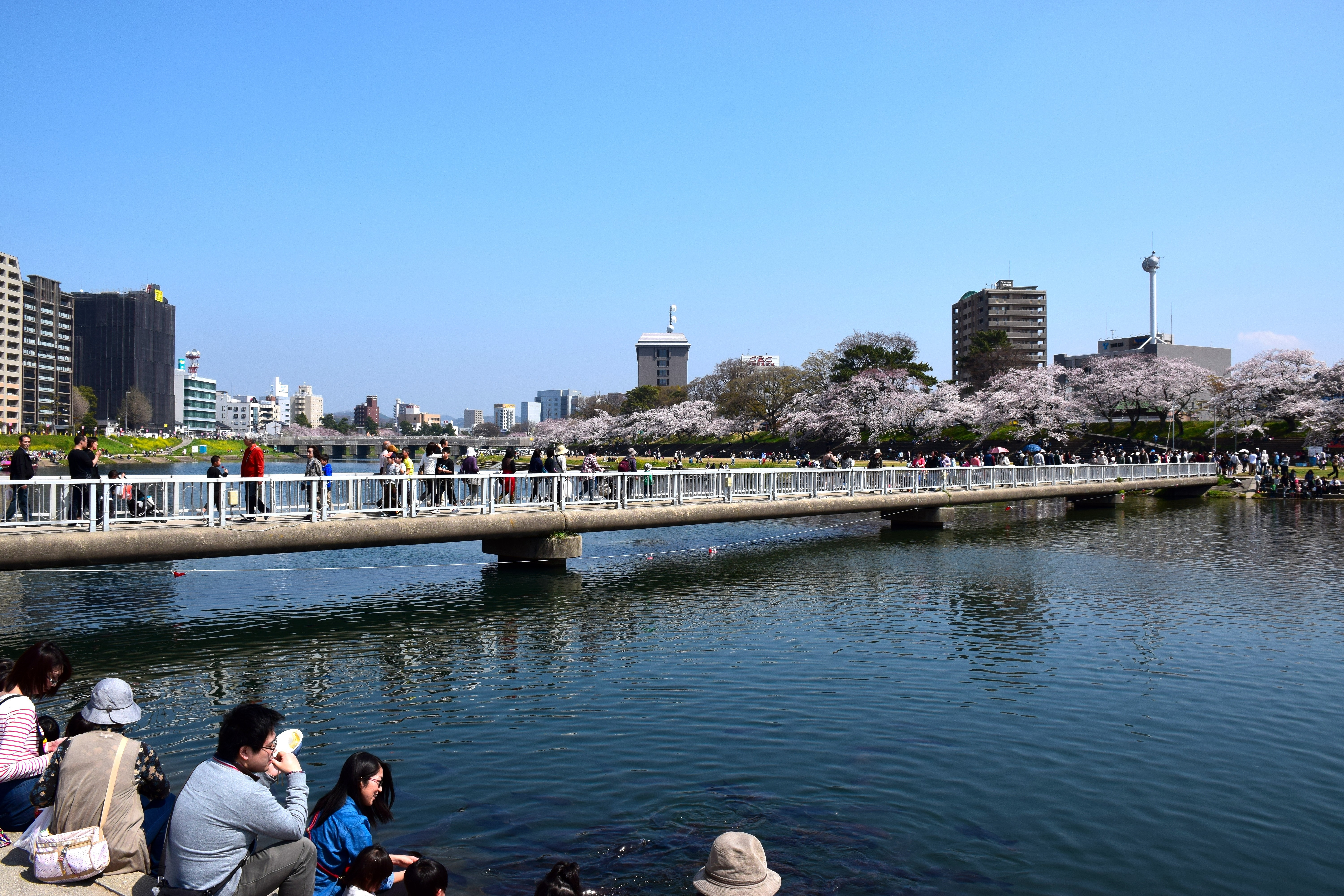 岡崎桜まつり